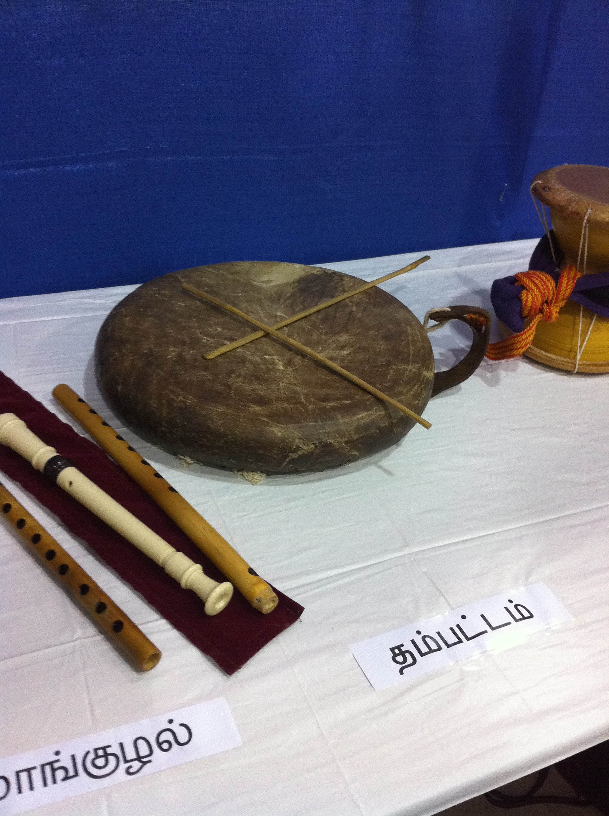 தமிழர் இசைக் கருவி - தம்பட்டம்